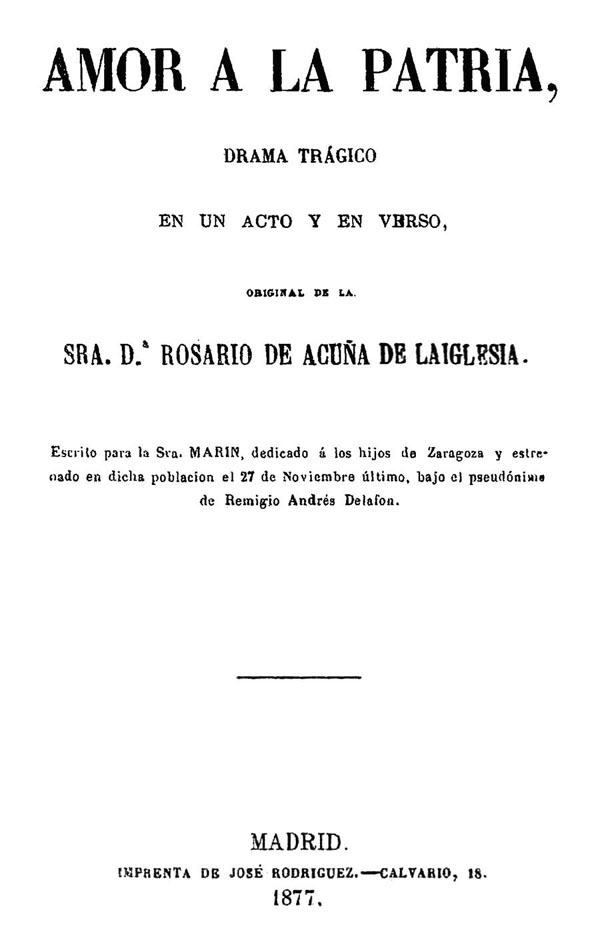 Amor a la patria: drama trágico en un acto y en verso, original de Rosario de Acuña. Madrid, Imprenta de José Rodríguez, 1877.